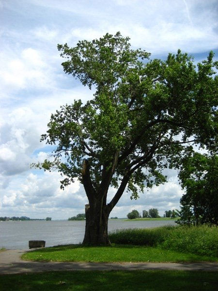 Vu du fleuve à Pointe-Aux-Trembles